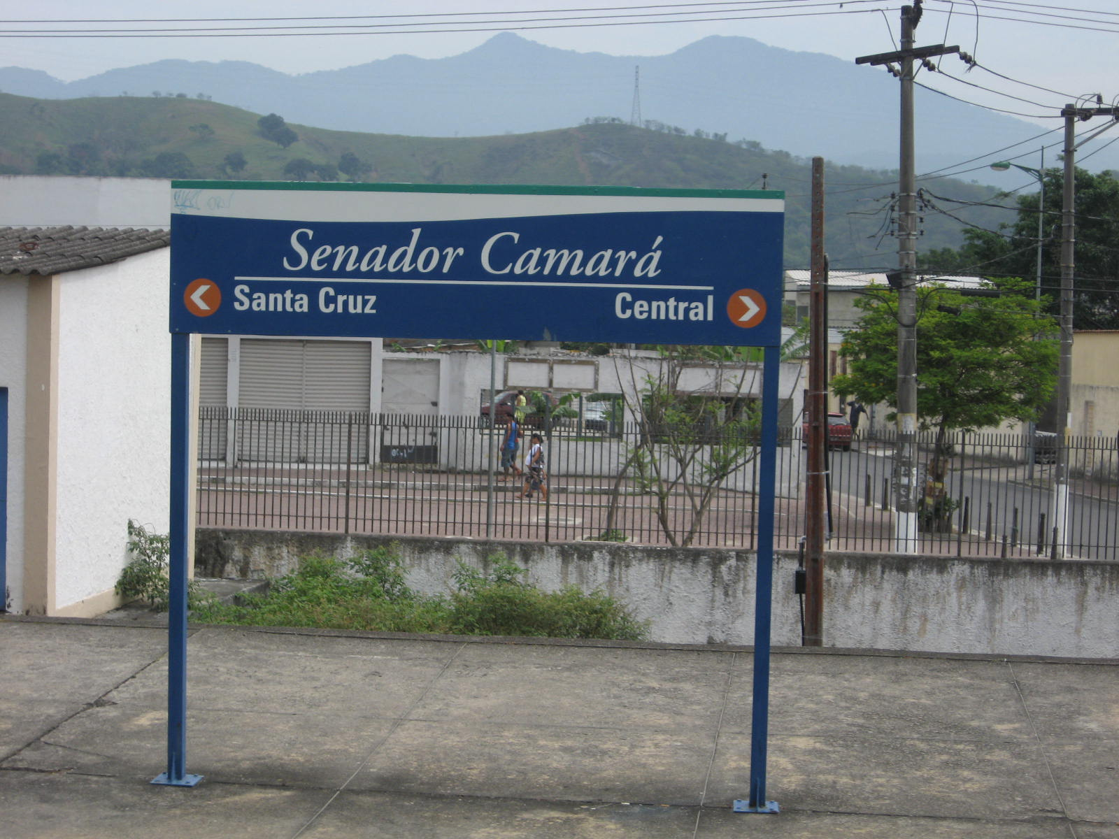 Estação de trem de Senador Camará, no Rio de Janeiro.